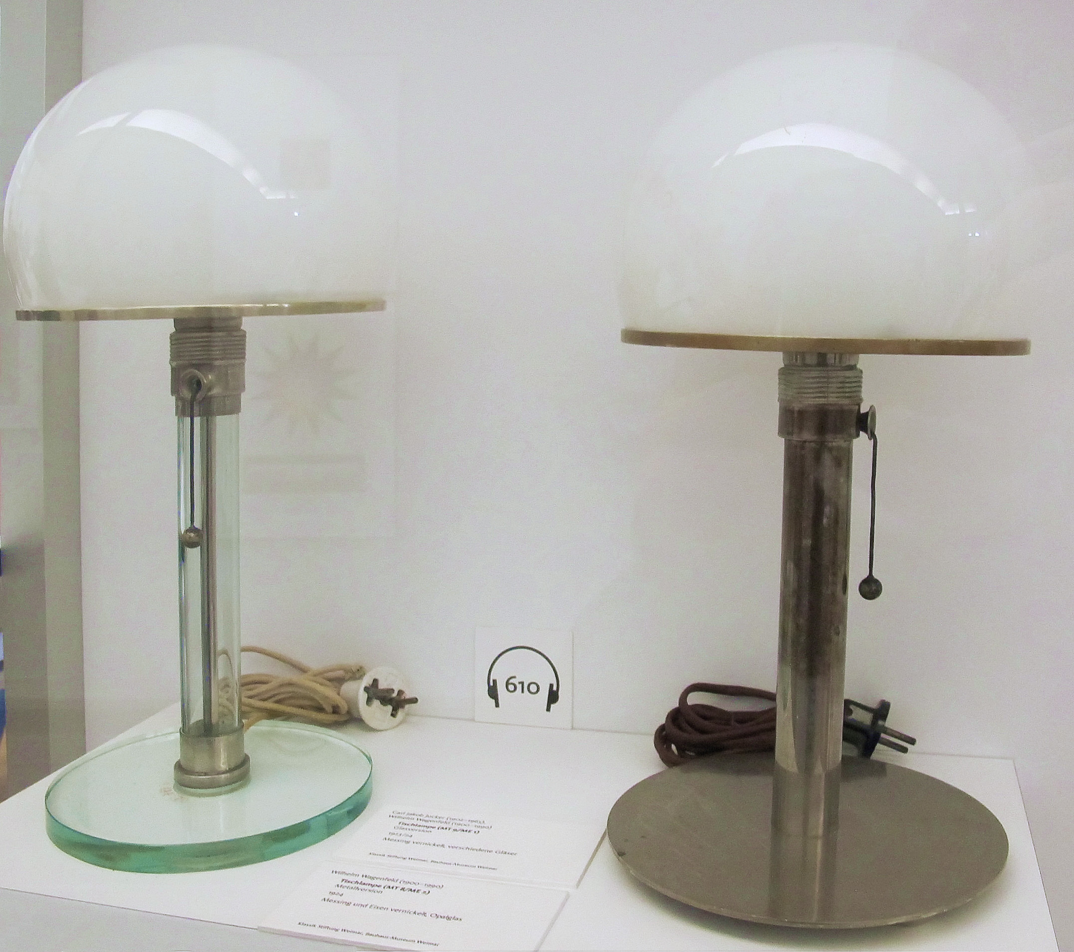 Tischlampe di Carl Jakob Jucker (left, 1923-24) e di Wilhelm Wagenfeld (right, 1924)